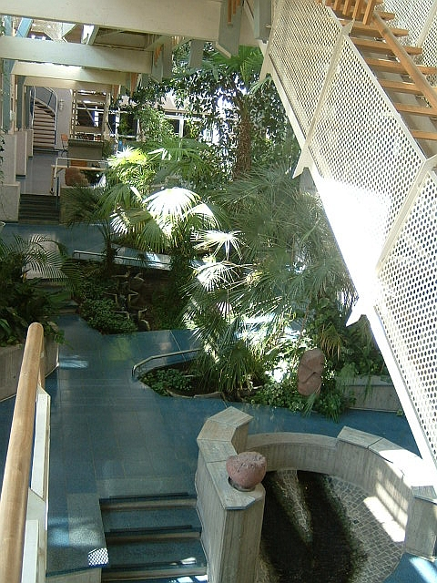 Ökohaus in Frankfurt-Bockenheim am Westbahnhof, Innenaufnahme. Im Vordergrund fließt ein Bach. In diesem Gebäude sind mehrere Firmen (Ärzte, Redaktionen, Verlagen und Büros, Veranstaltungszentrum und Druckerei) untergebracht, darunter auch ein Restaurant.